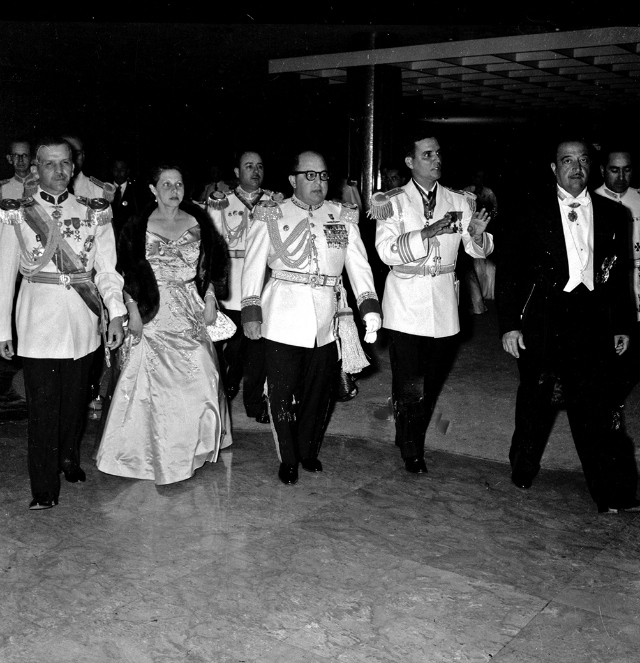 Oscar Mazzei Carta, Doña Flor Chalbaud de Pérez Jiménez, Marcos Pèrez Jiménez, Wolfang Larrazabal y el civil es don José Giacopini Zárraga.